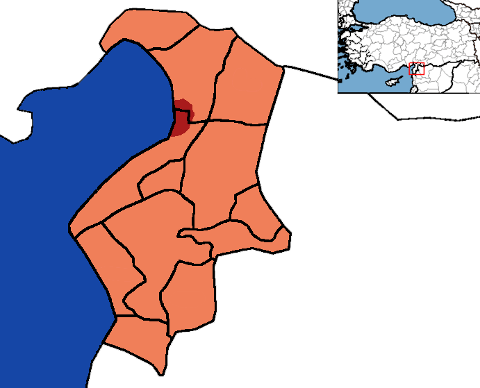 Hatay ilçeler haritası.